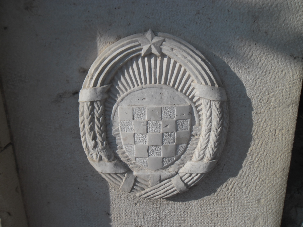 grb Socijalističke Republike Hrvatske uklesan u partizanski spomenik na Hvaru